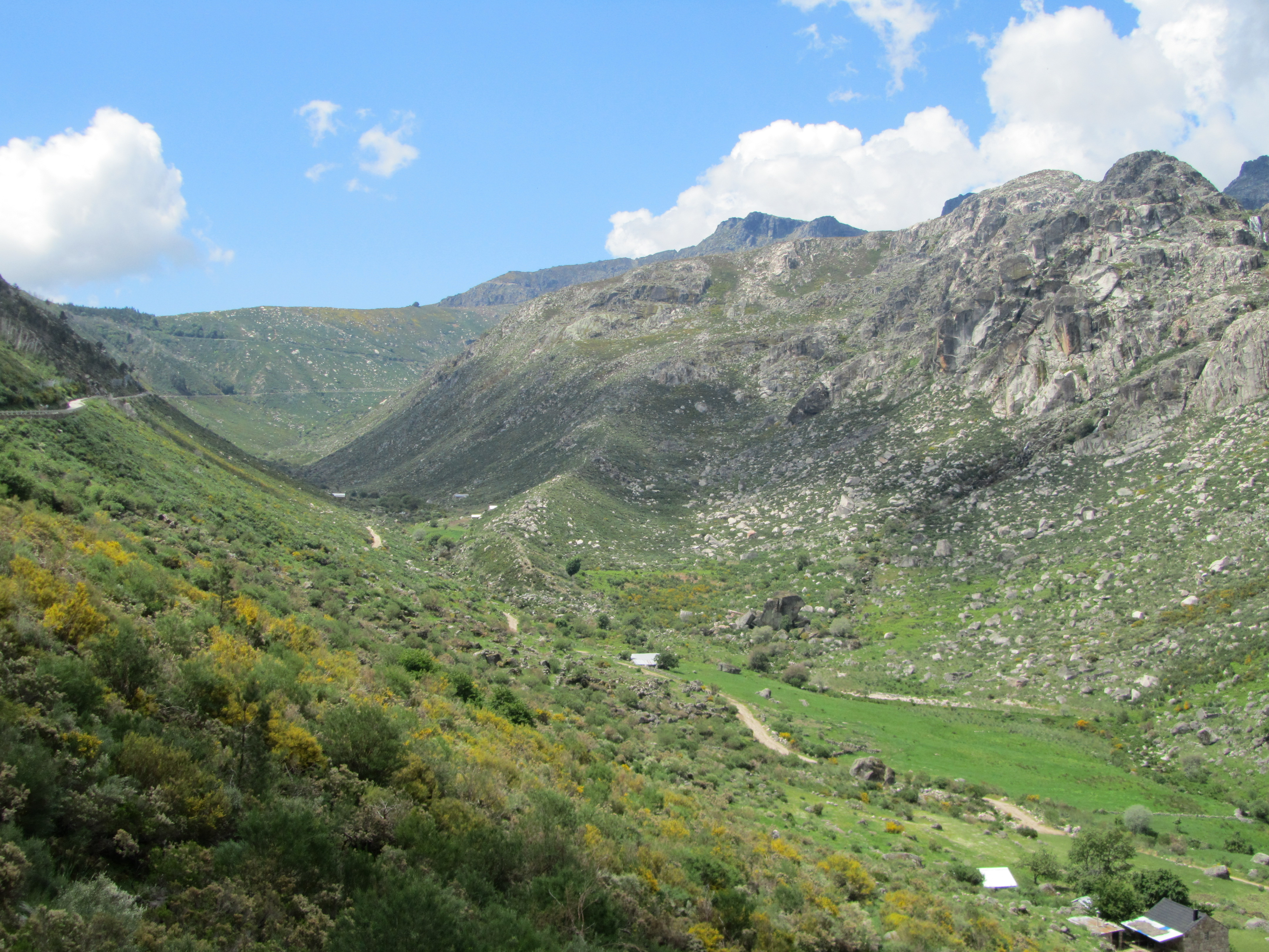 Espinhaço de Cão. Moreia na confluência do glaciar da Candeeira com o glaciar do Zêzere. Serra da Estrela. Portugal.